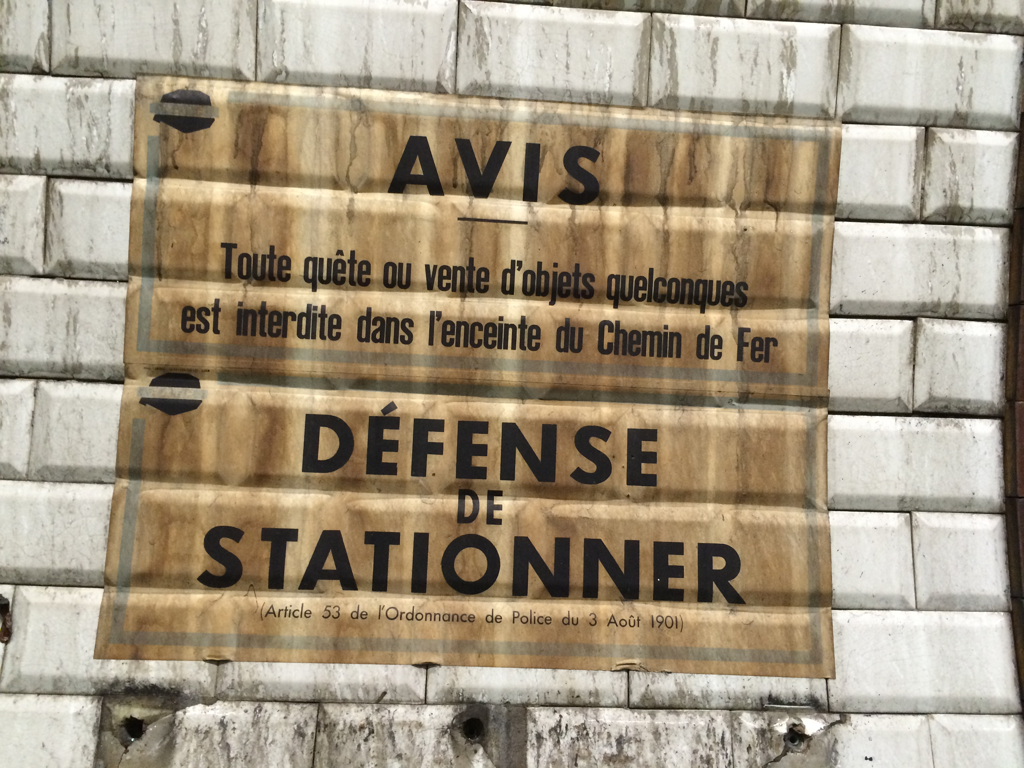 Sur les quais de la station Trinité - d'Estienne d'Orves décarossée : traces d'une ancienne affiche sur la vente à la sauvette